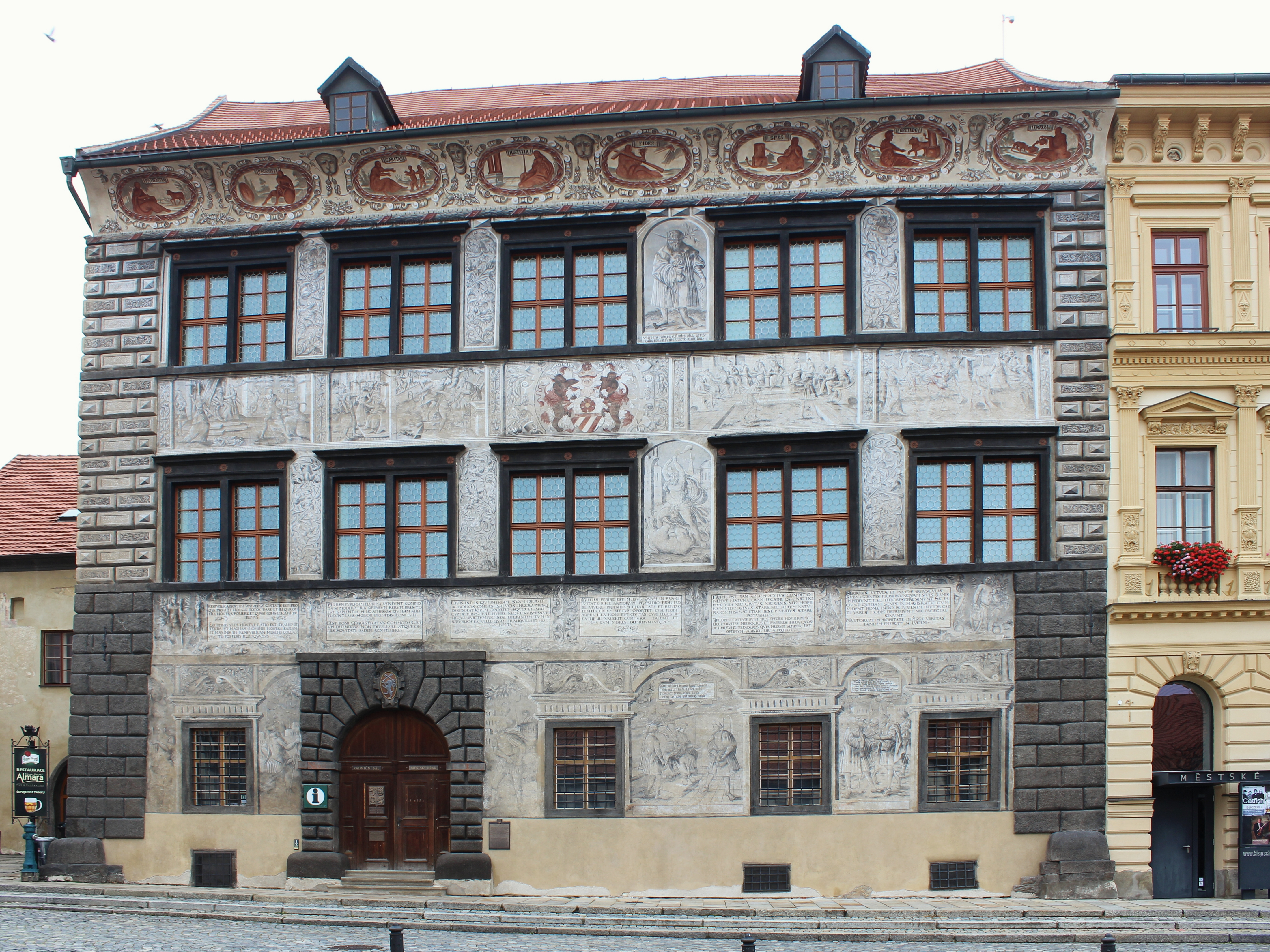 Prachatice